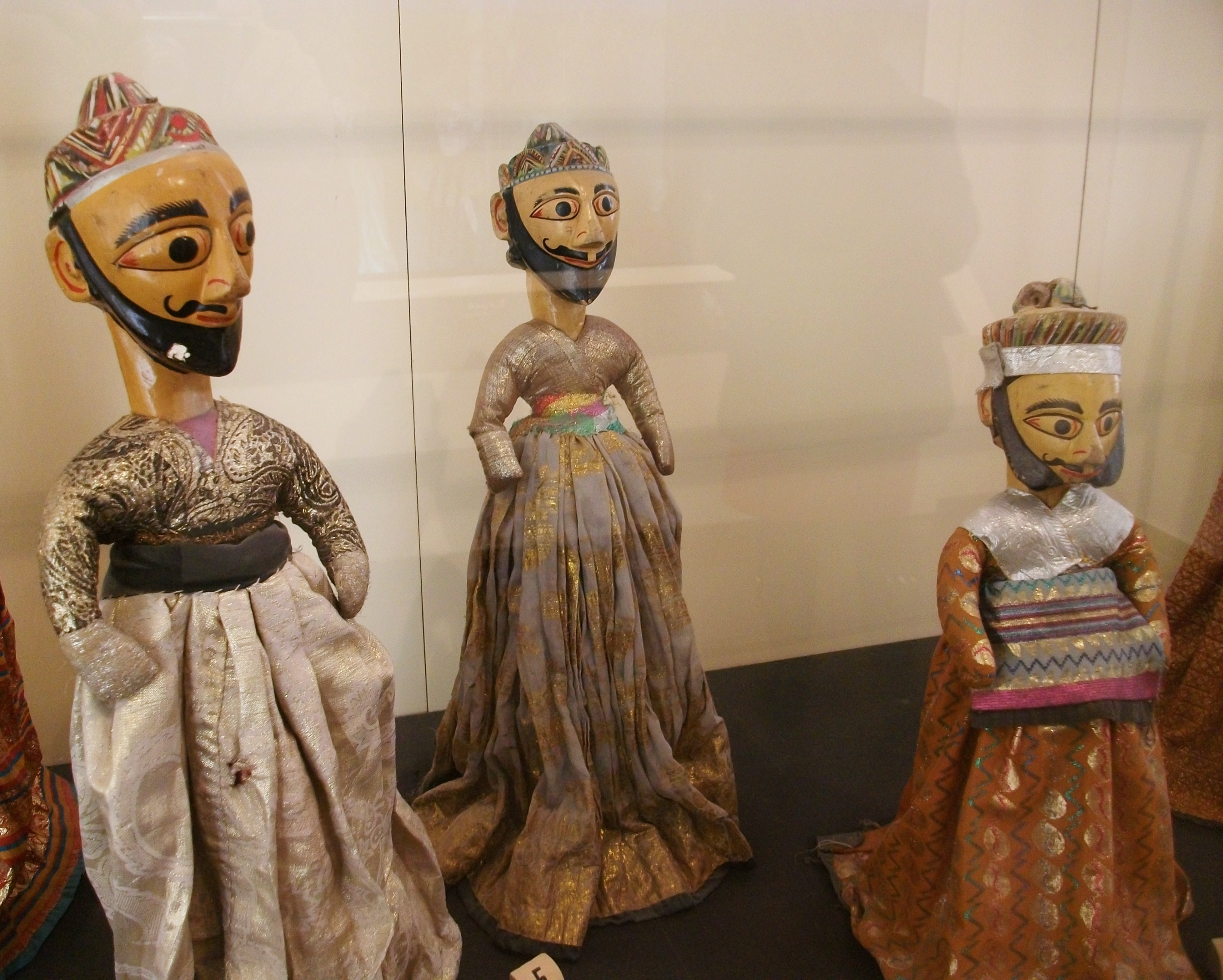 Titelles pakistaneses del Patay Khan al MITA (Museu Internacional de Titelles d'Albaida).